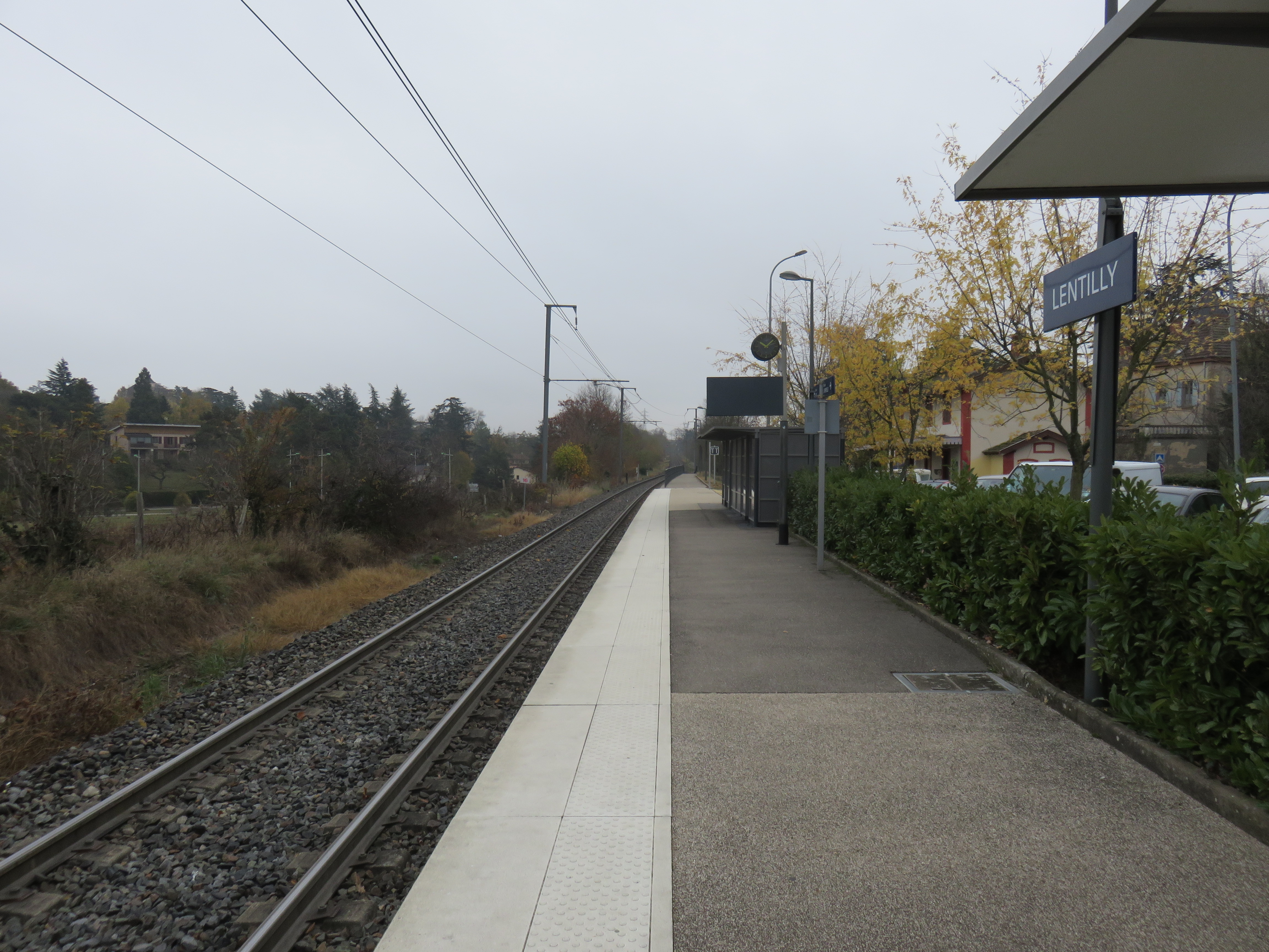 Quai et vue de la voie en direction de Lyon, de la gare SNCF de Lentilly (Rhône, France).